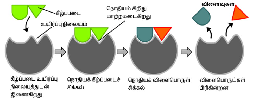 நொதியத்தின் தொழிற்பாடு